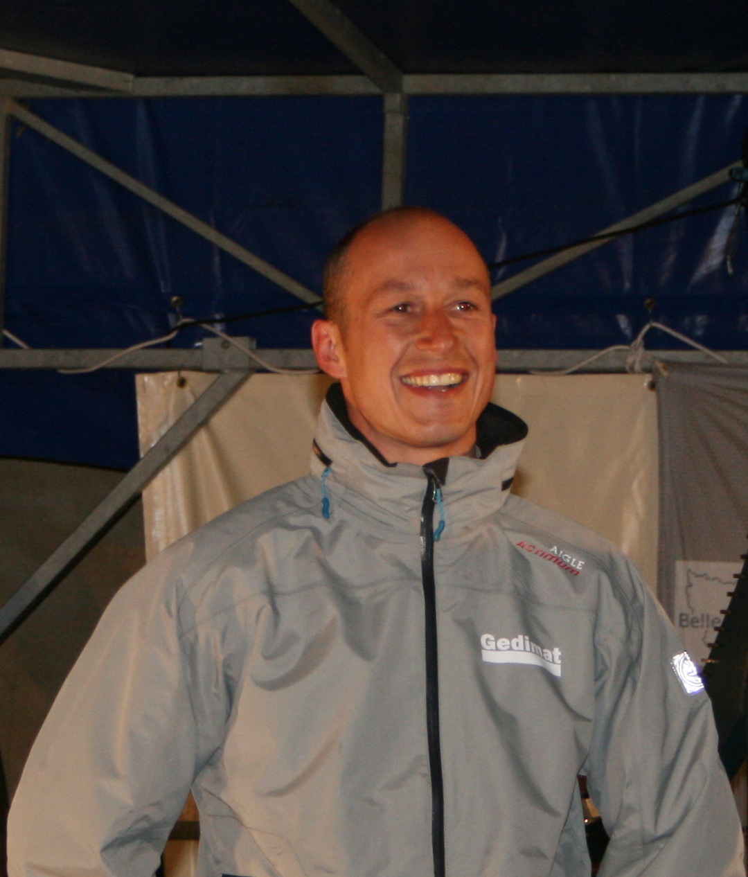 Description =Armel Tripon. Soirée présentation des shippers a Belle-Ile lors du Trophée BPE Source =Photo taken by Remi Jouan Date =Mars 2007 Author =Remi Jouan